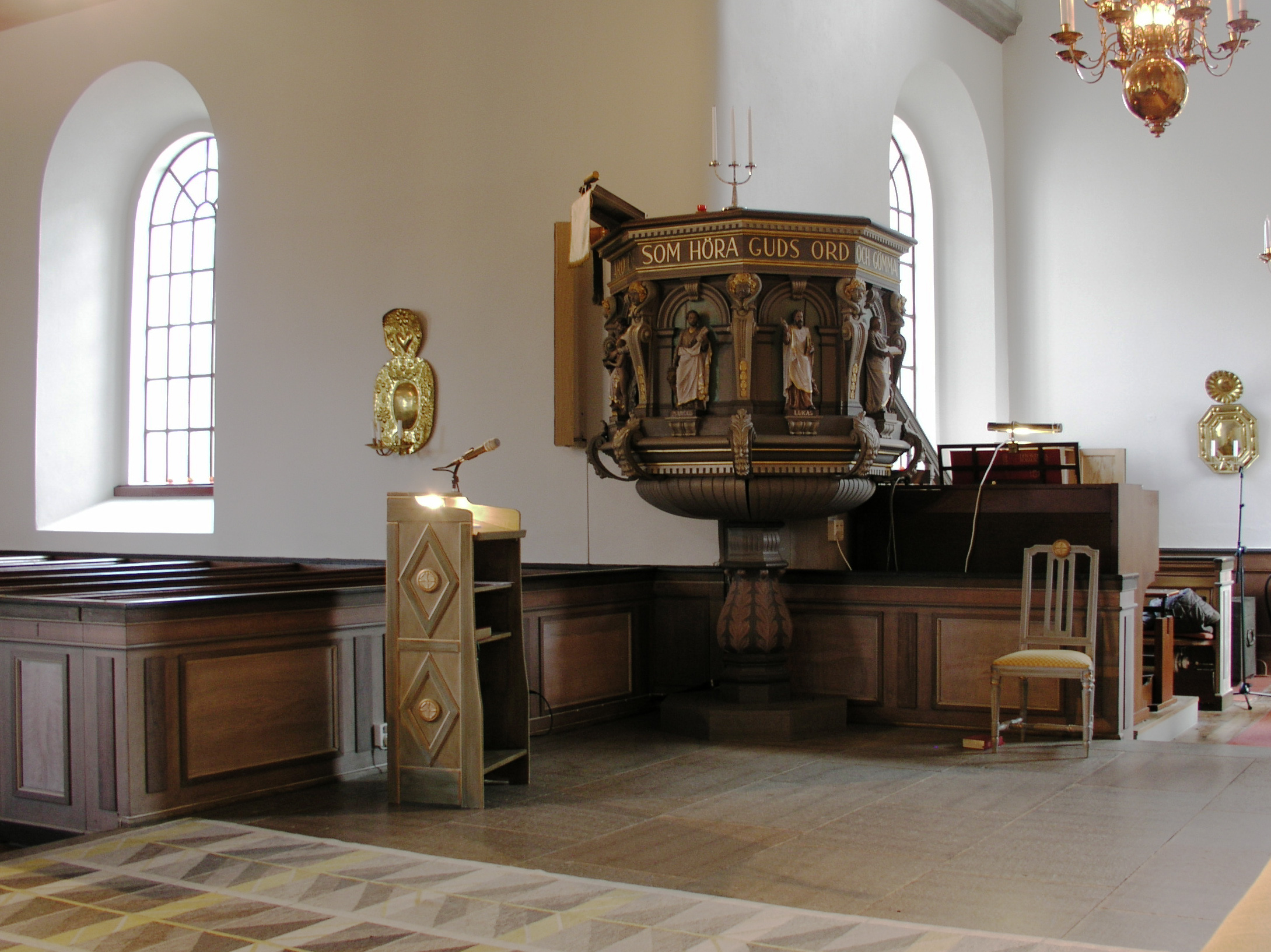 Kärna kyrka, Malmslätt. Diocese of Linköping. Sweden. Pulpit.